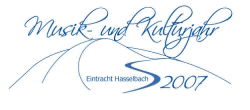 Logo Musik- und Kulturjahr 2007